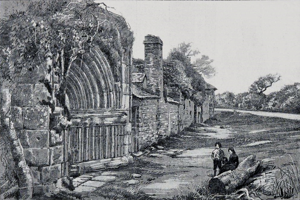 Les ruines du monastère du Petit-Guélen (ancienne chapelle dédiée à Sainte-Anne datant du XIIIe siècle) en Ergué-Armel, désormais en Quimper (dessin de A. Karl)